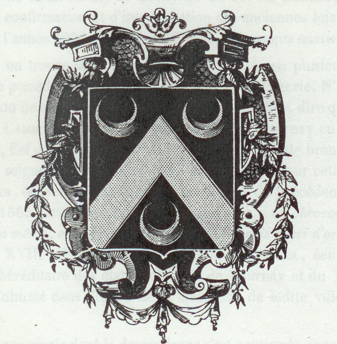 de sable, au chevron d'or, accompagné de trois croissants du même